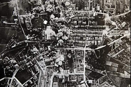 Durangoko bonbardaketaren irudia